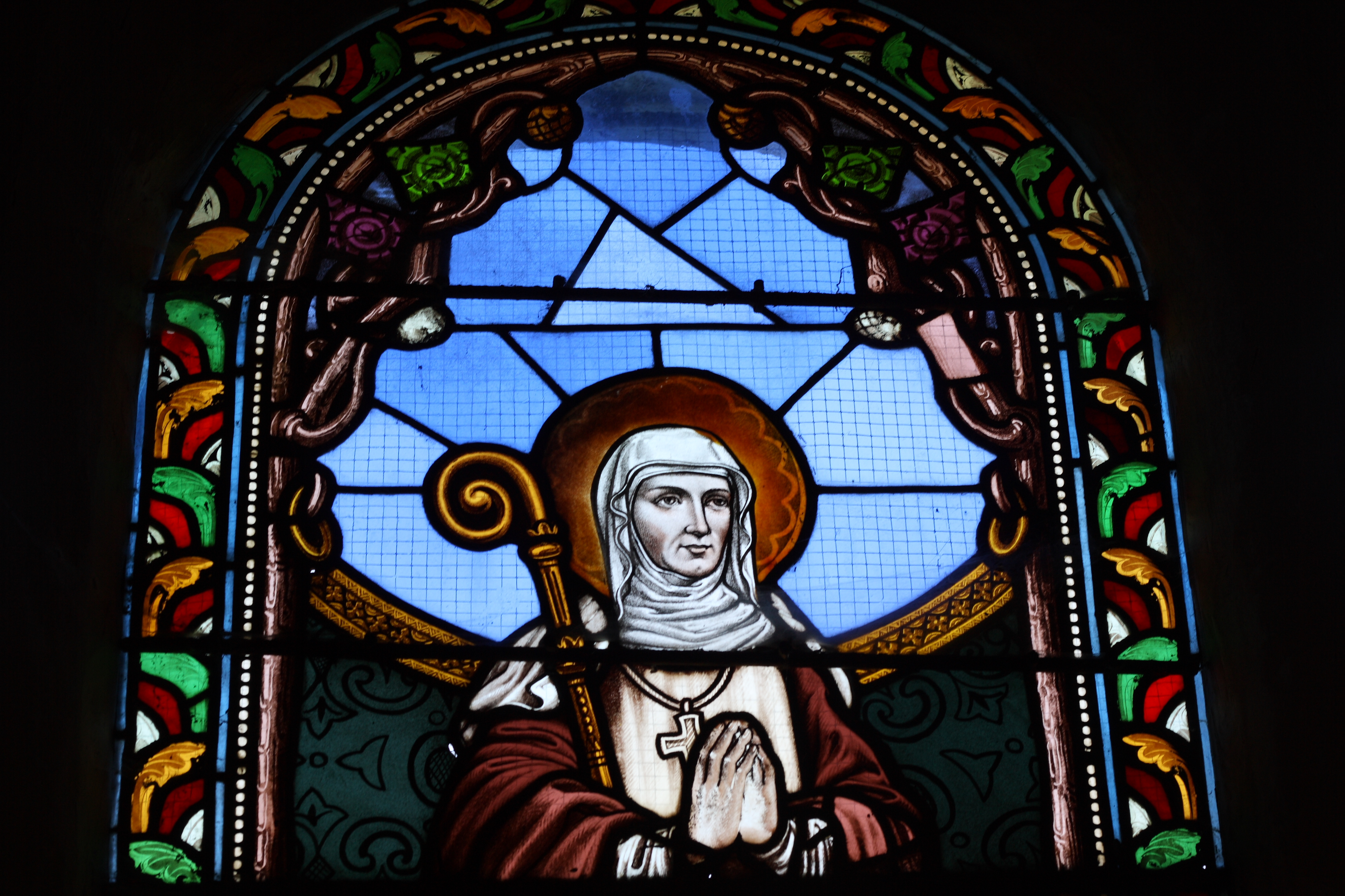 Katholische Kirche Saint-Sulpice in La Celle-sur-Morin im Département Seine-et-Marne in der Region Île-de-France (Frankreich), Bleiglasfenster (Ausschnitt), Darstellung: hl. Fara (Burgundofara), Äbtissin im 7. Jahrhundert in Faremoutiers